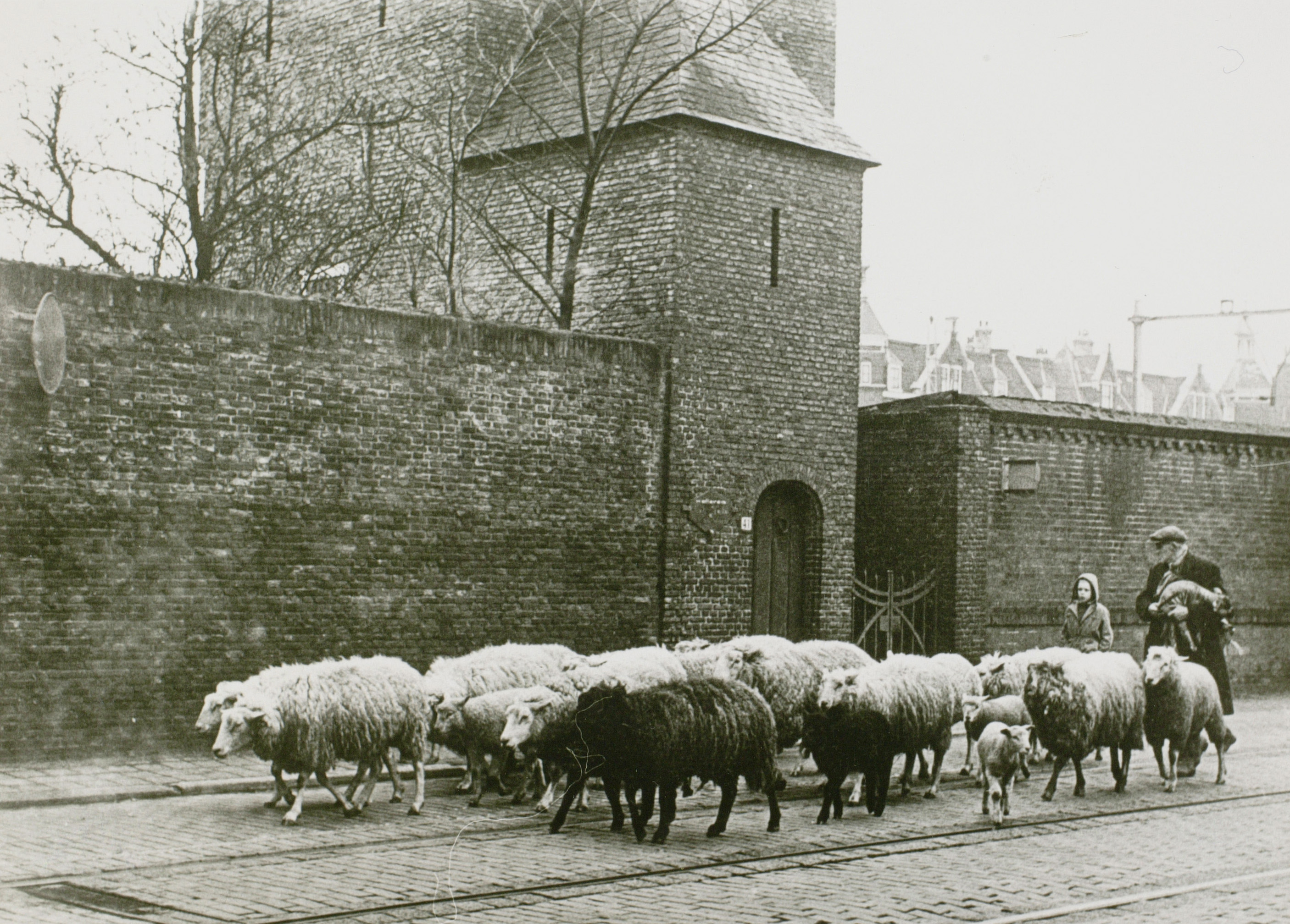 Bagijnetoren